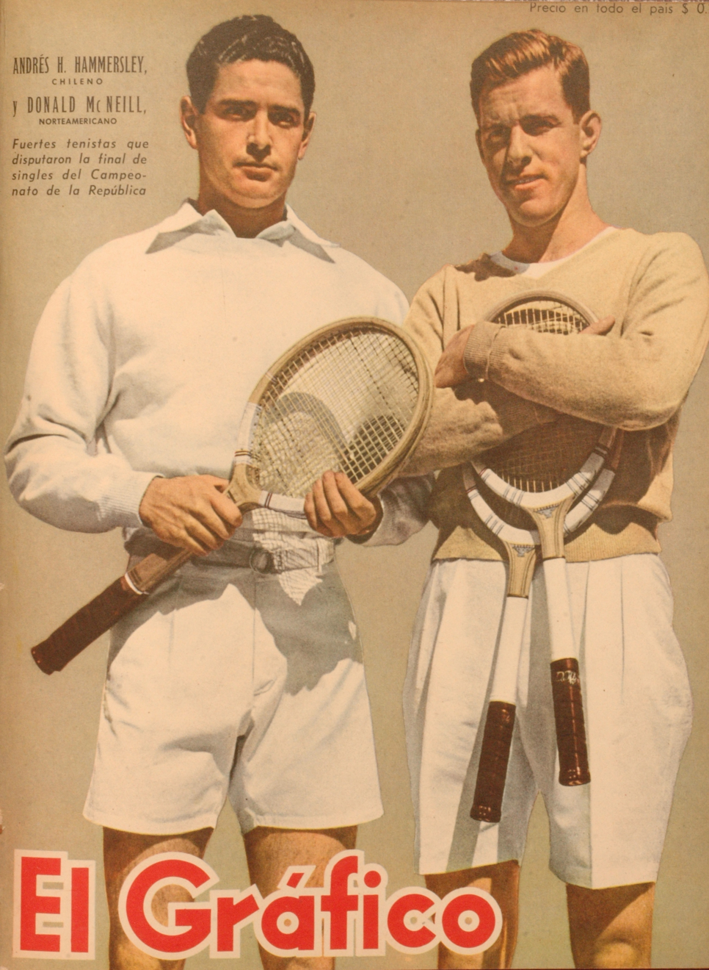 El Grafico del 04 de Diciembre de 1942. Edicion 1221